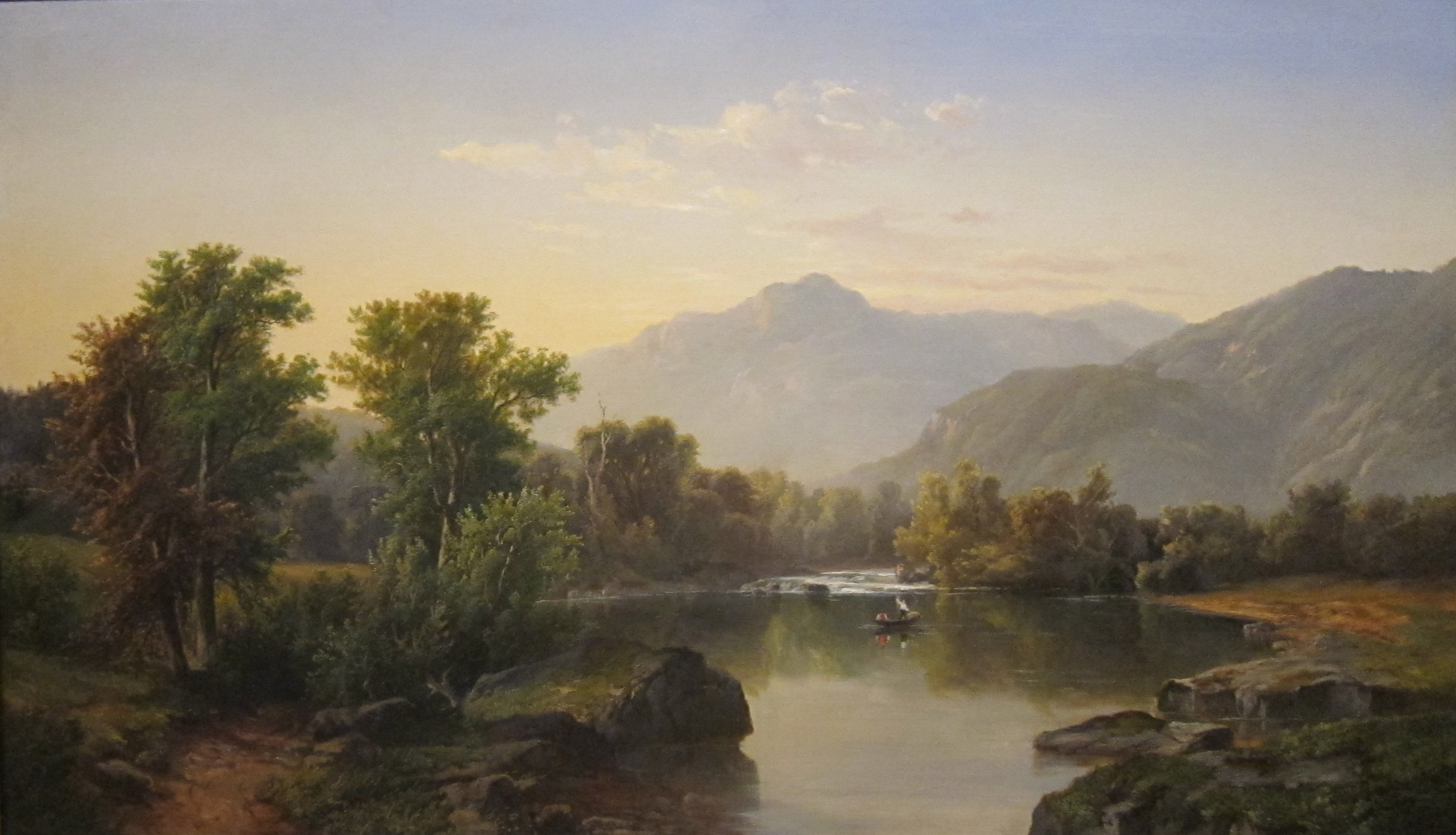 Landscape